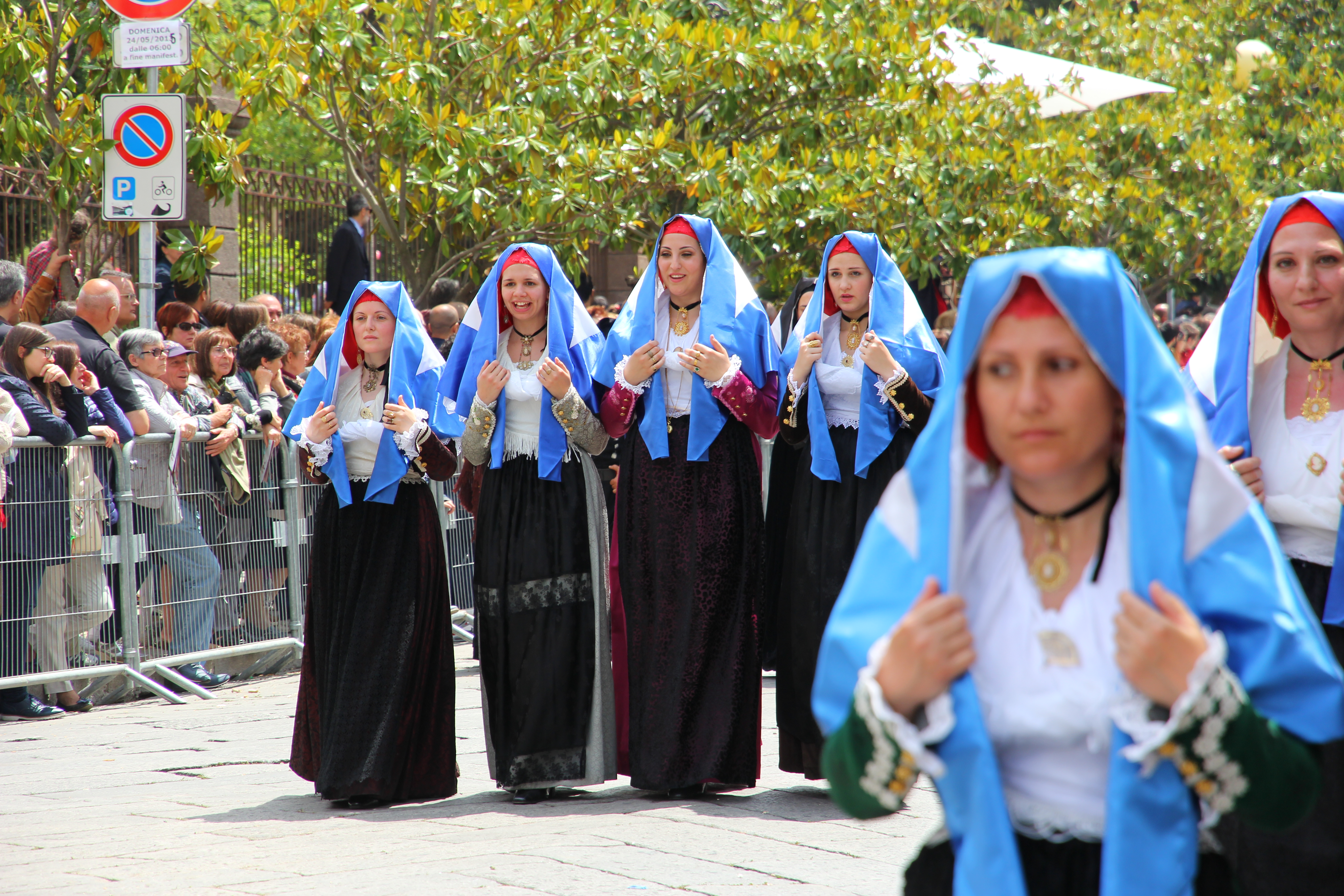 Costume tradizionale